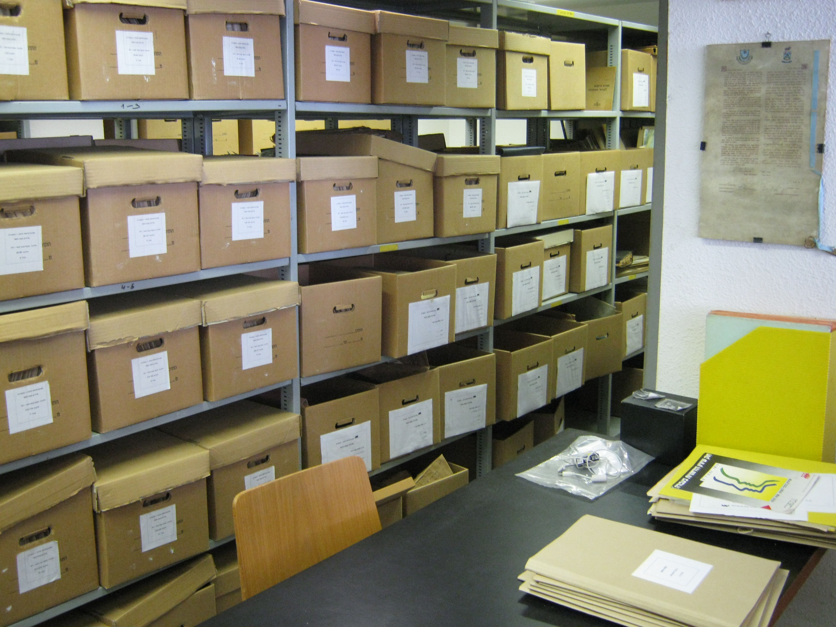 תיקים בארכיון ע"ש אבא חושי